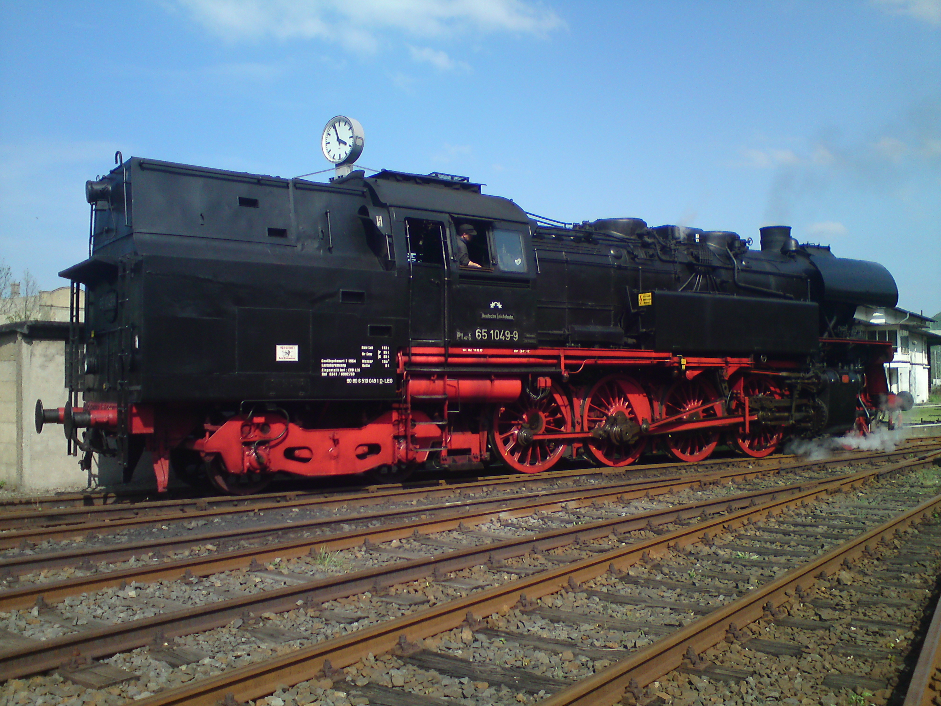 Lokomotive 65 1049-9 während des Heizhausfestes 2010 in Löbau.